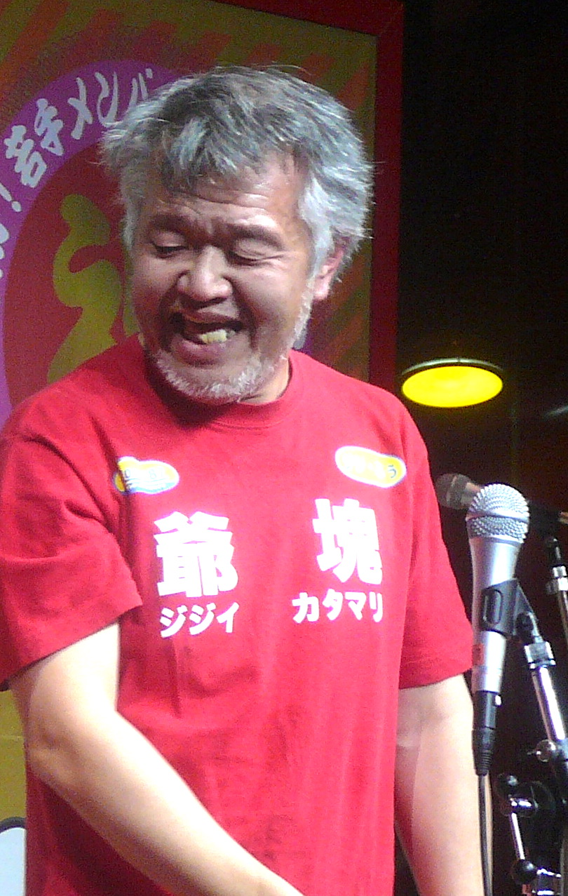 ジジ・ぶぅ (Jiji Bu)